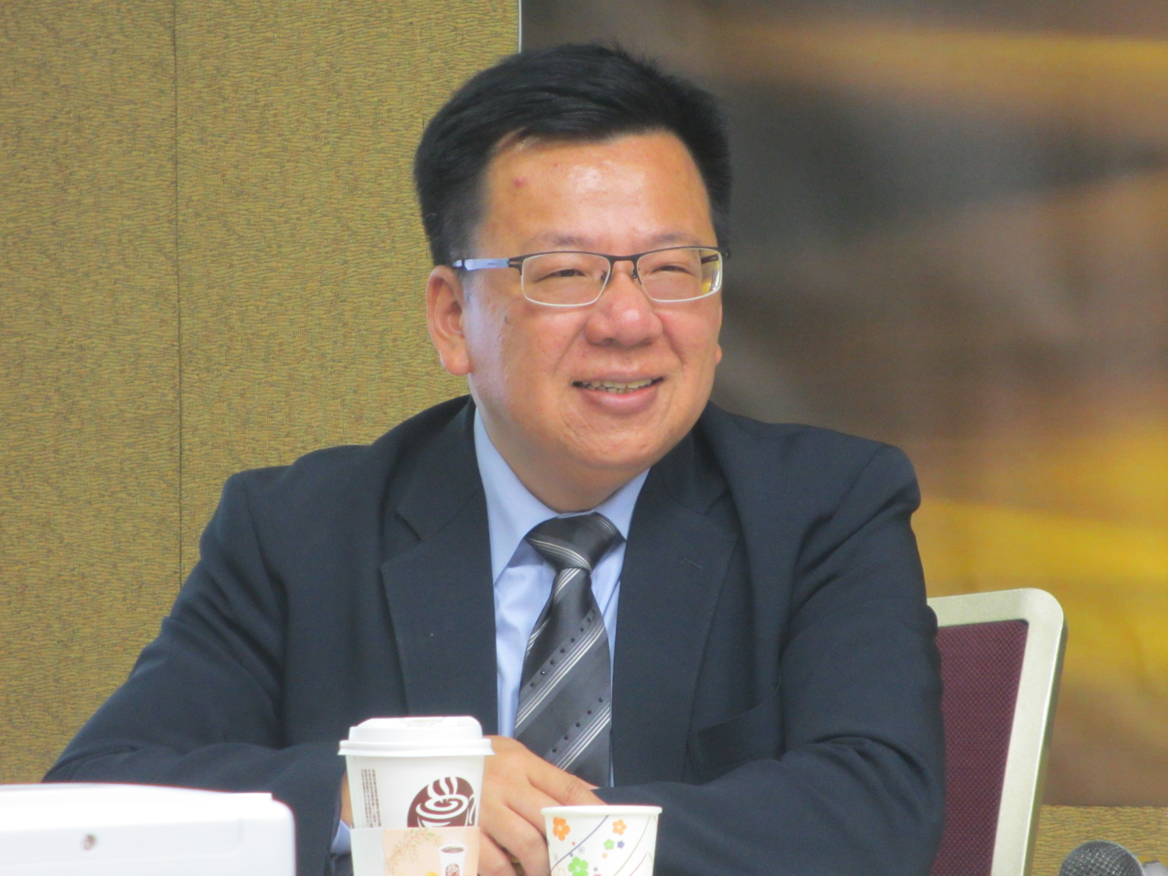 中文（台灣）: 民主進步黨立法委員李俊俋出席台灣民意基金會「後馬英九時代的台灣對外關係」民調記者會。